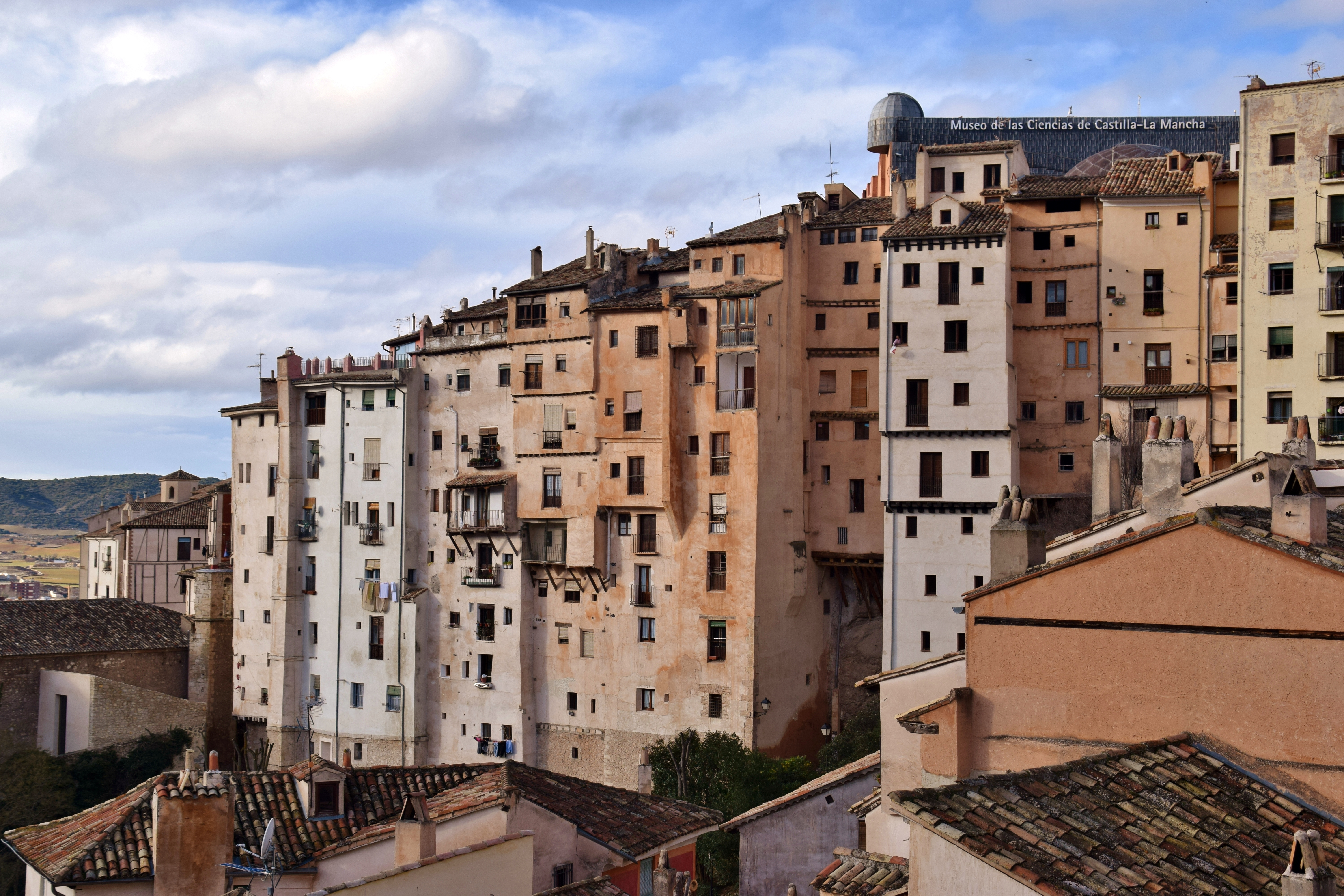 Estos edificios fueron levantados entre el siglo XV y el XIX como una solución al crecimiento demográfico que sufría la ciudad. La imaginativa solución era descolgar plantas a través de la montaña que da a la hoz, clavando vigas en la misma roca. Así se iban creando plantas según la necesidad.